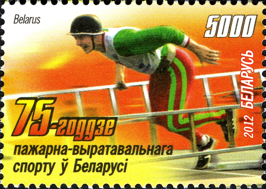 75-годдзе пажарна-выратавальнага спорту ў Беларусі